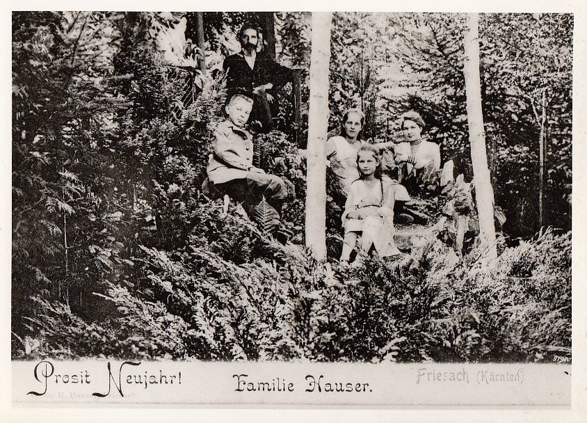 Hubert Hauser (2. v. li) und seine Kinder